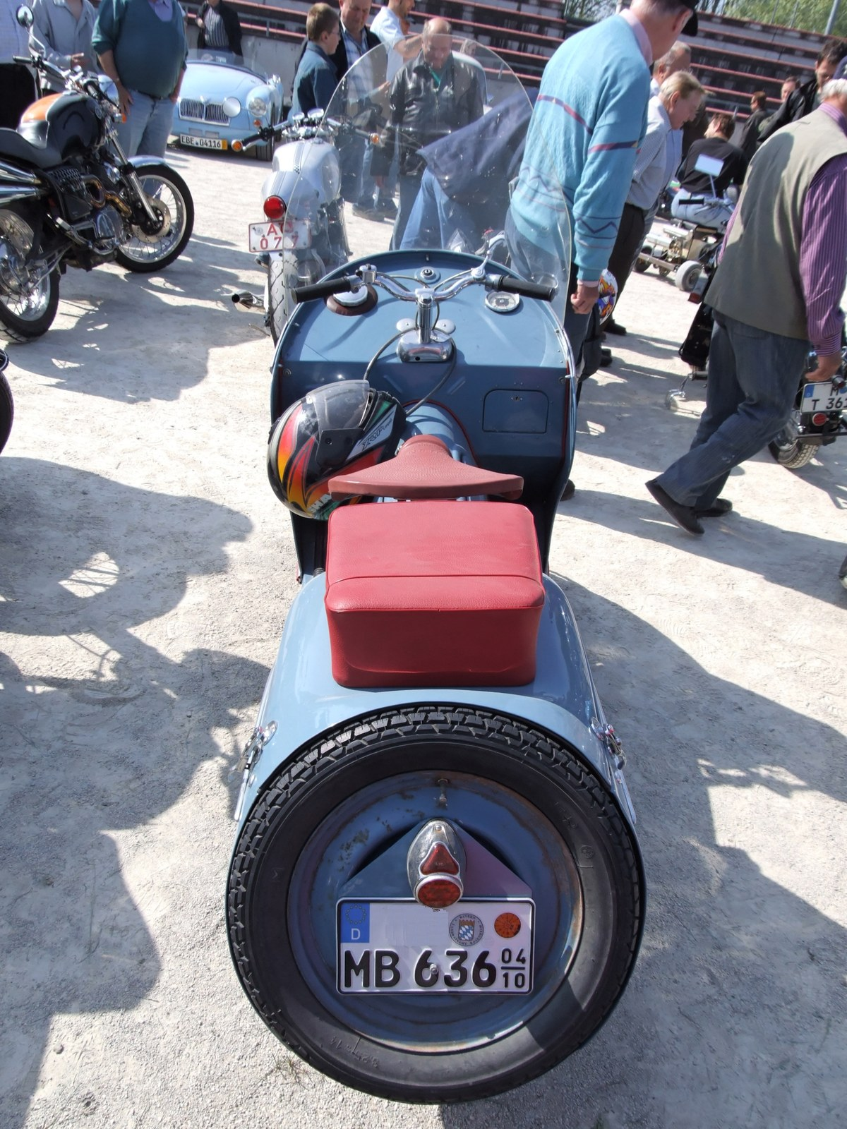 Quelle: selbst fotografiert, 04/2007 Fotograf: Späth Chr.